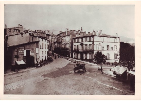 Place Antonin Chastel (Sous-Préfecture) en 1900